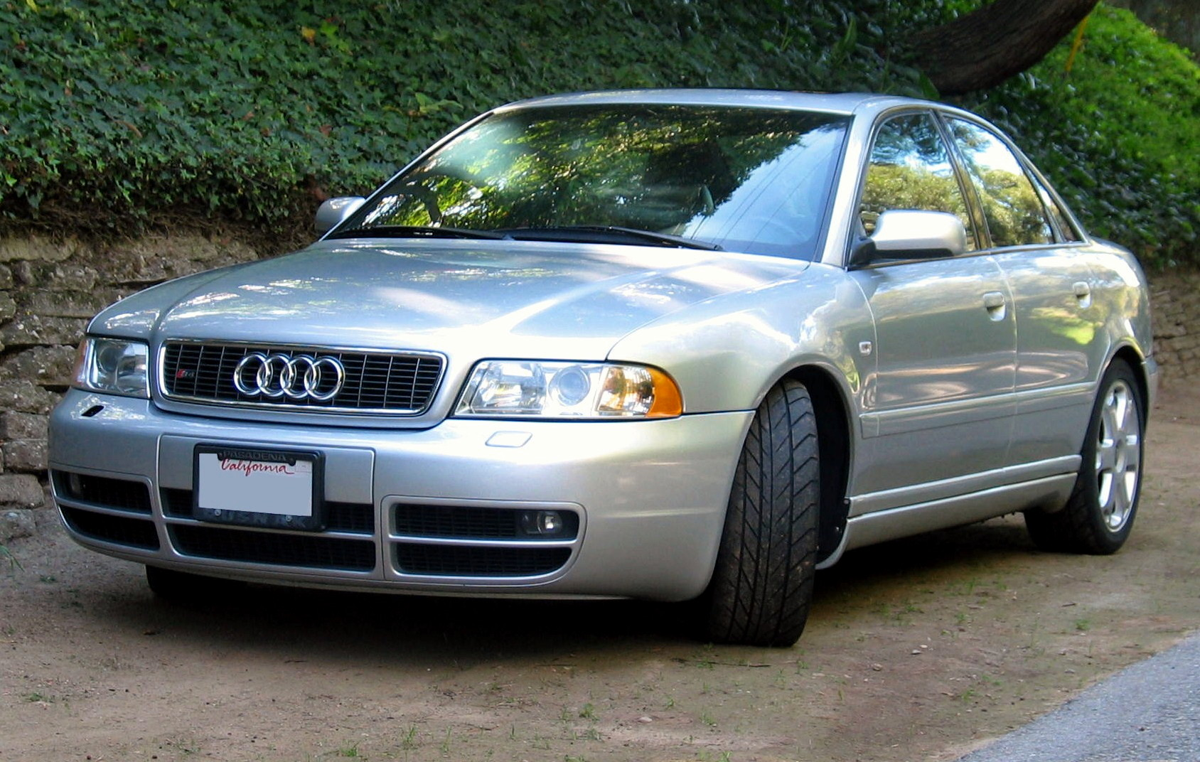 Audi S4 (B5) sedan